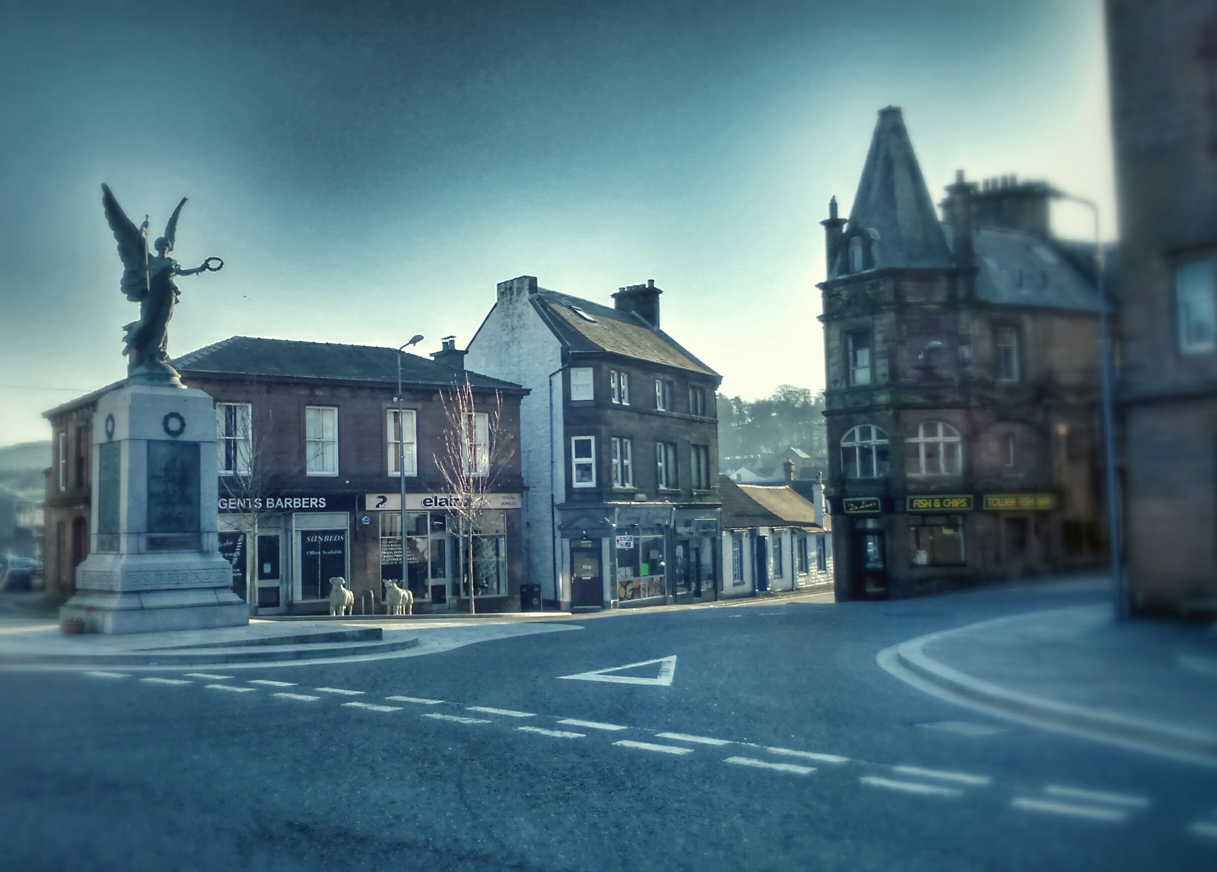 Gàidhlig: Sealladh air Logarbaidh